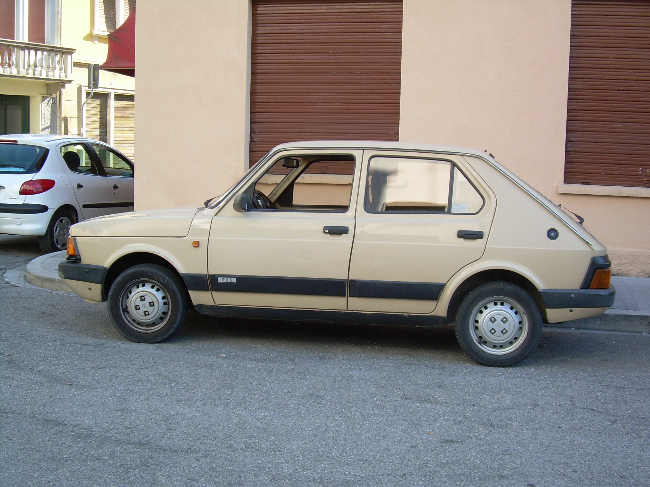 Autore: Powering Una Fura 900 CL.